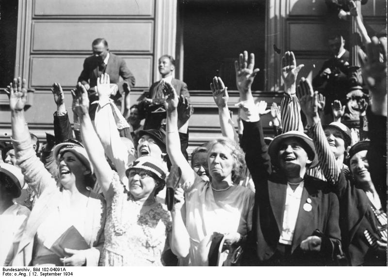 Empfang des Diplomatischen Korps bei Hitler am 12. September 1934